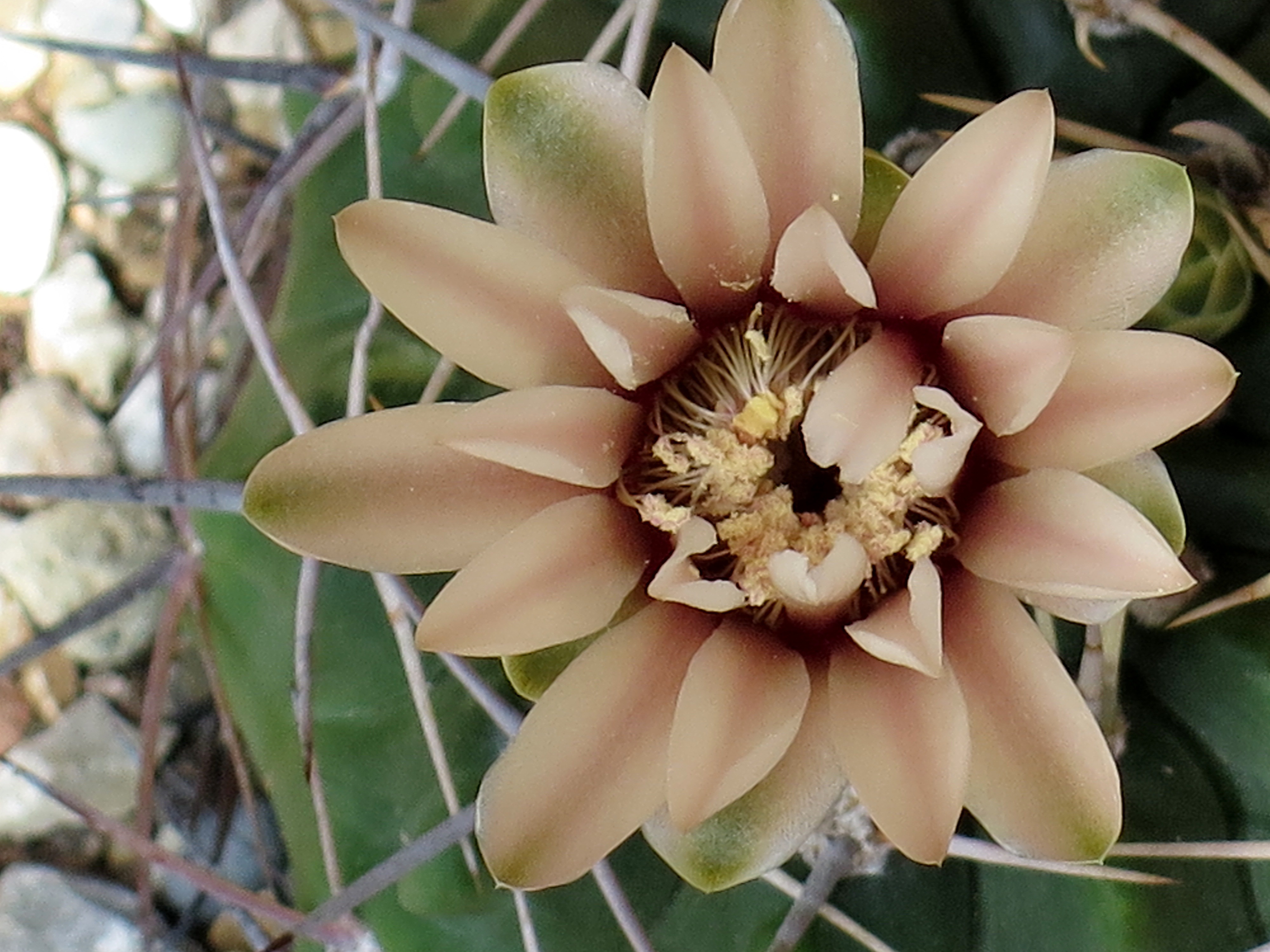 Il fiore del gymnocalycium valnicekianum